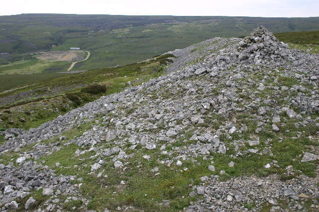 Ancient Defensive Systems, Harkerside Moor